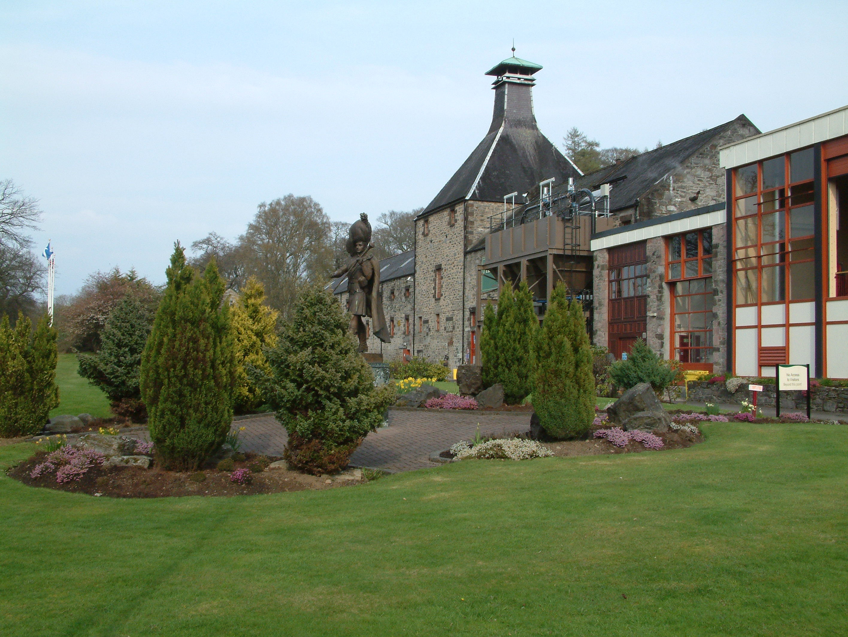 foto StaraBlazkova 2006